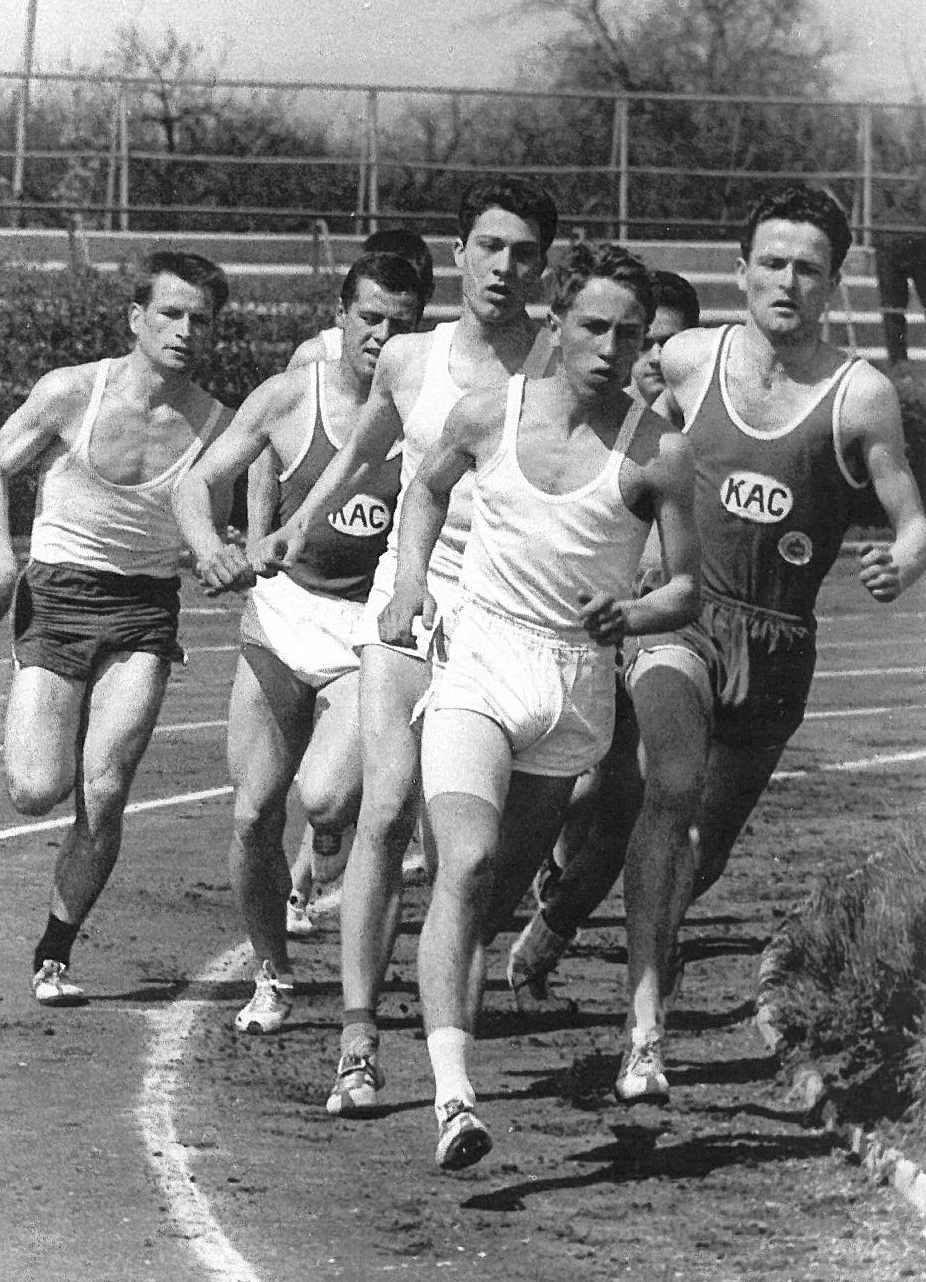 800 m Lauf- 5. Rekordverbesserung